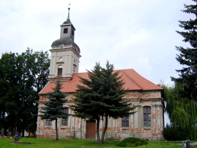 Karow, Sachsen-Anhalt, Kirche